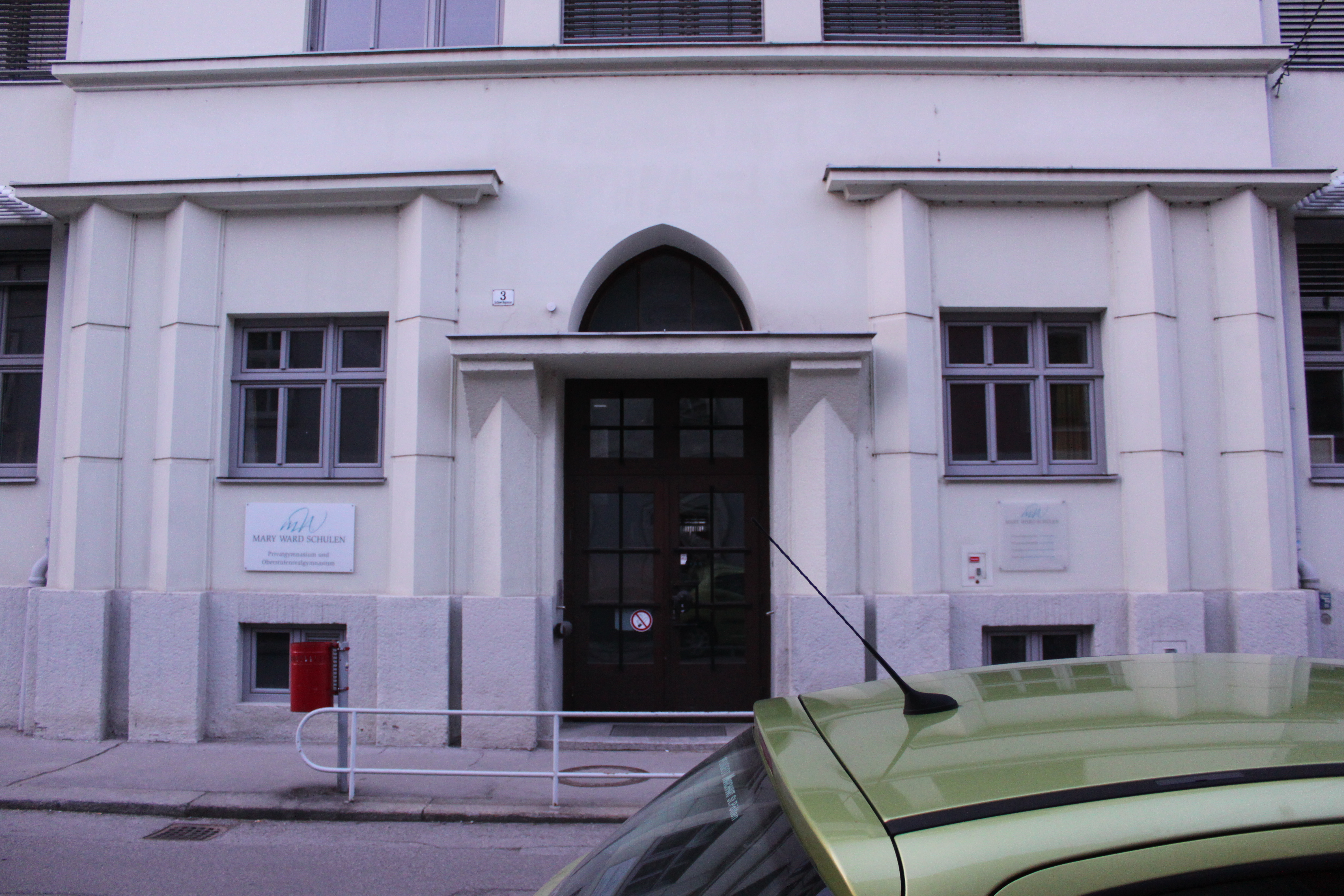 Schule des Instituts der Englischen Fräulein, Schneckgasse 3, Portal, über Eck gestellte Pilaster, Verdachung